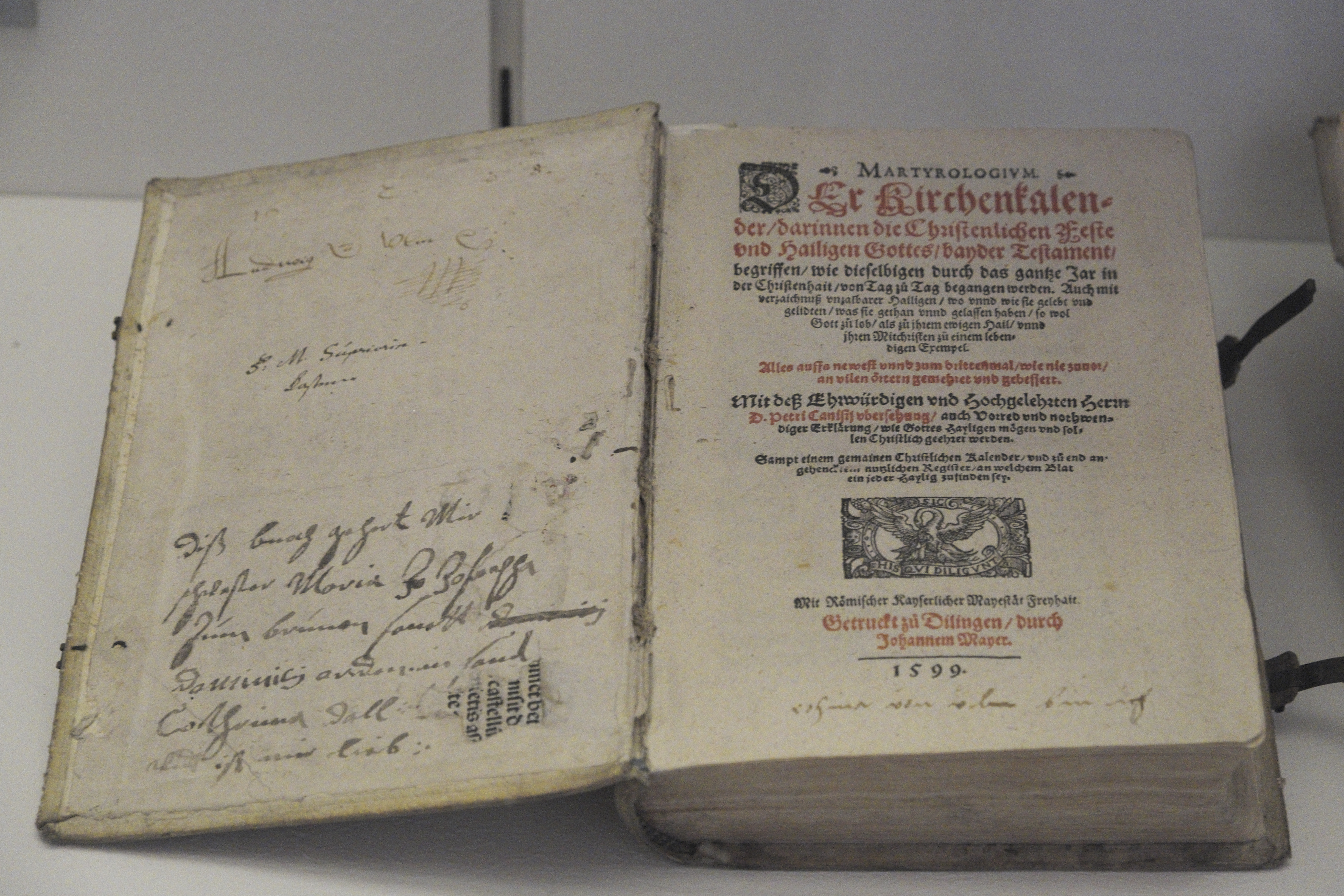 Stadt- und Hochstiftmuseum in Dillingen an der Donau, Kirchenkalender, gedruckt durch Johannes Mayer, von 1599